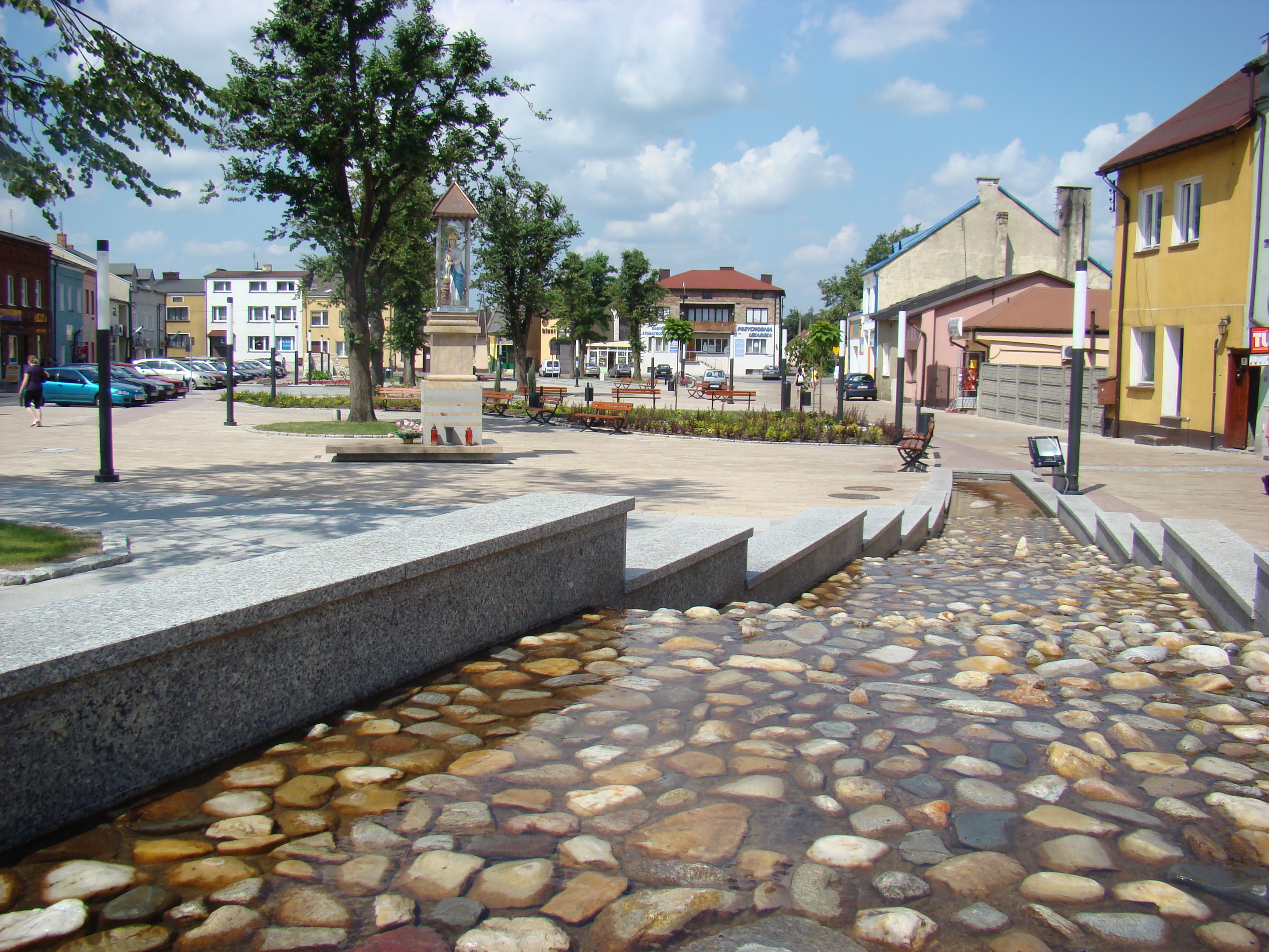 Fontanna na Starym Rynku w Żarkach Żarki 05.1953.